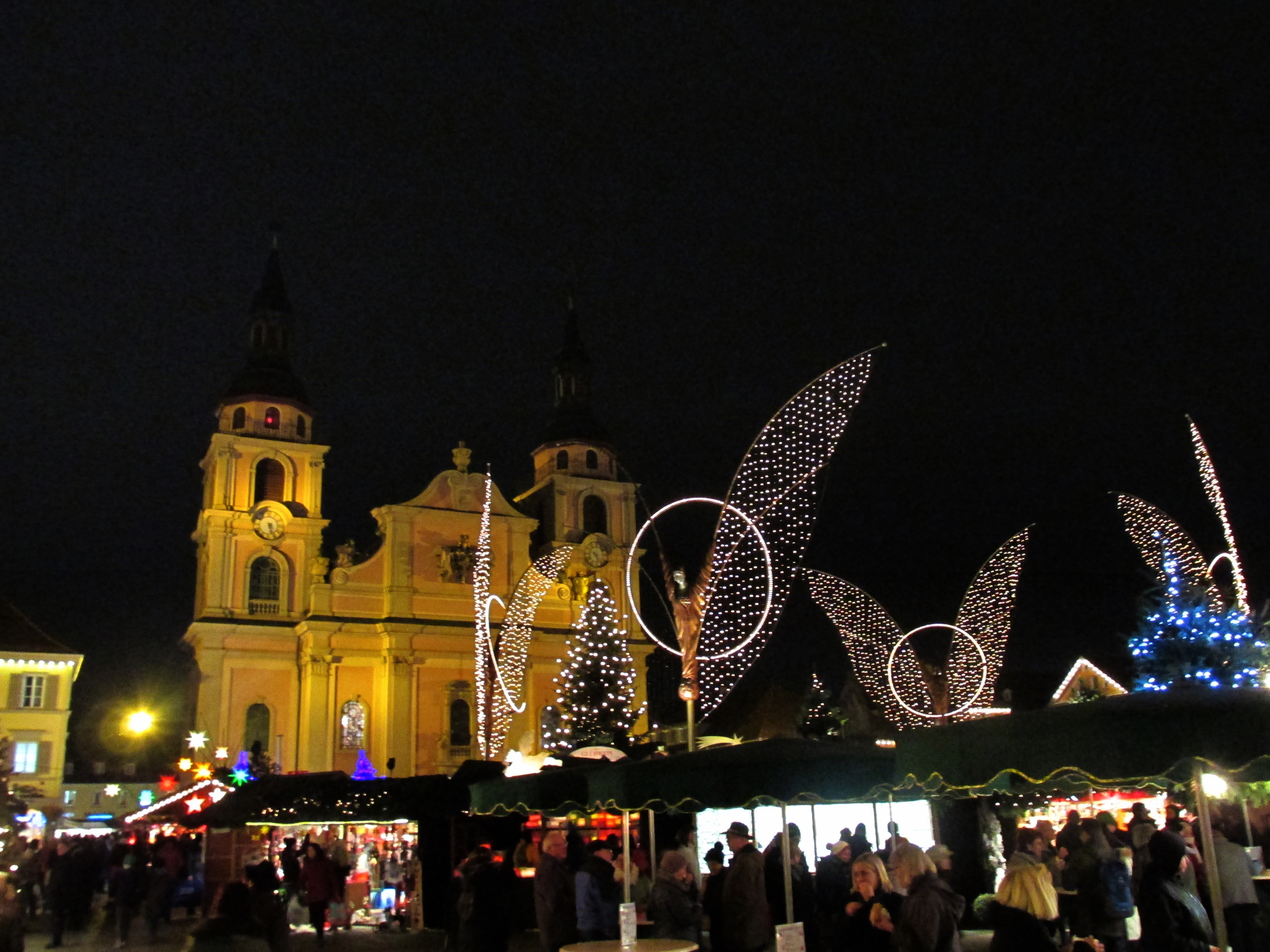 Barockweihnachtsmarkt - Ludwigsburg